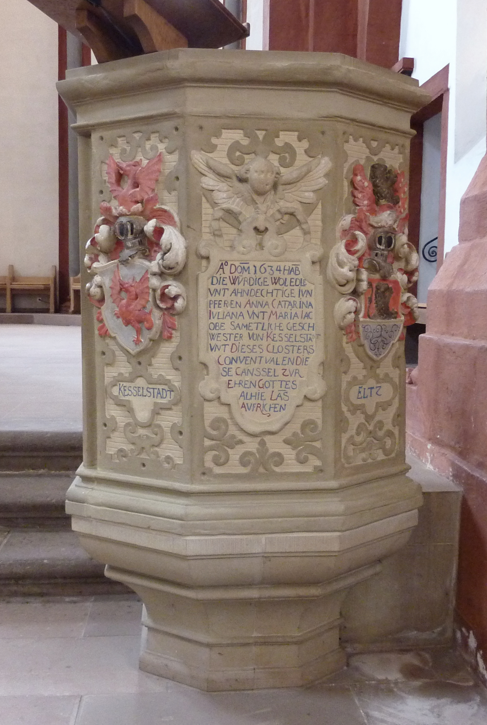 Ehemaliges Zisterzienserinnenkloster Sankt Thomas an der Kyll in Sankt Thomas im Eifelkreis Bitburg-Prüm (Rheinland-Pfalz), Steinkanzel von 1634, mit Wappenreliefs